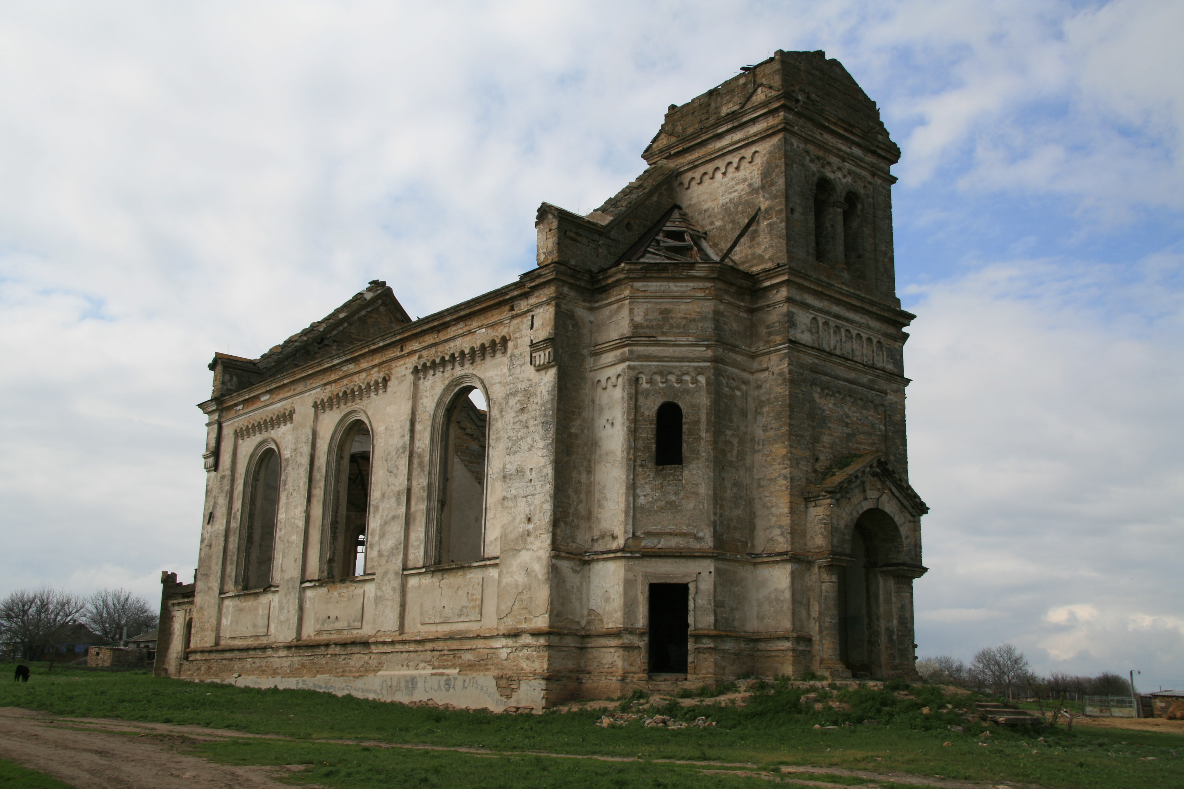 Німецька церква, село Краснопілля